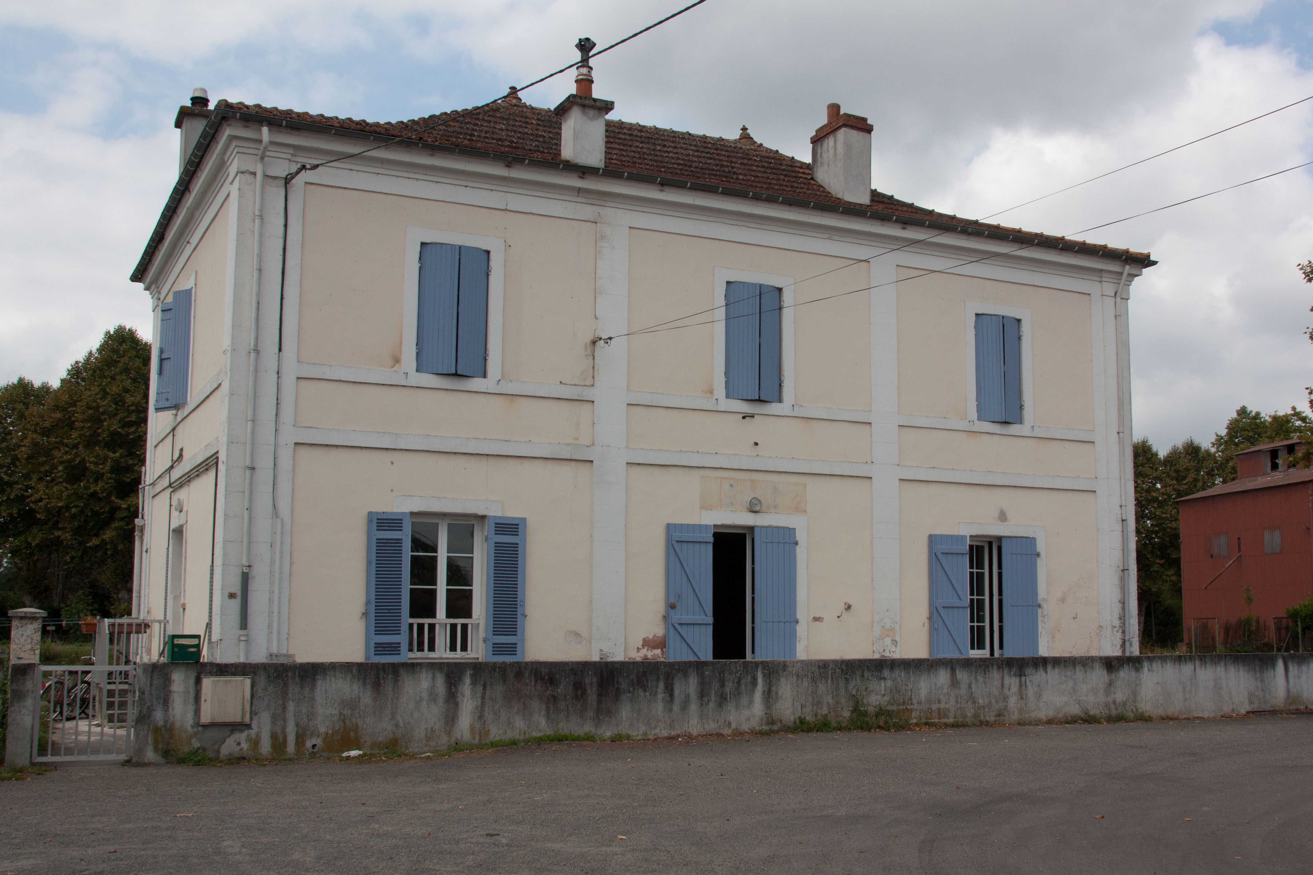 Ligne de Morcenx à Bagnères-de-Bigorre / Bâtiment voyageurs de l'ancienne gare de Maubourguet / Hautes-Pyrénées / France